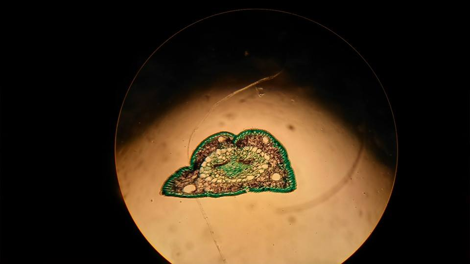 Sección transversal de una acícula de Pinus halepensis.